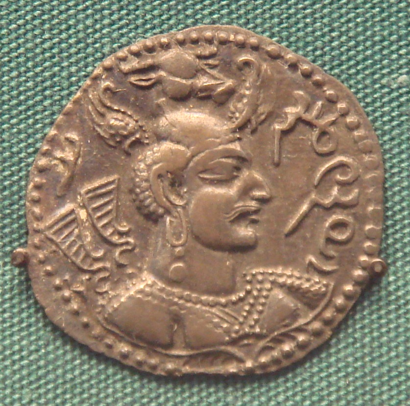 Huna king.